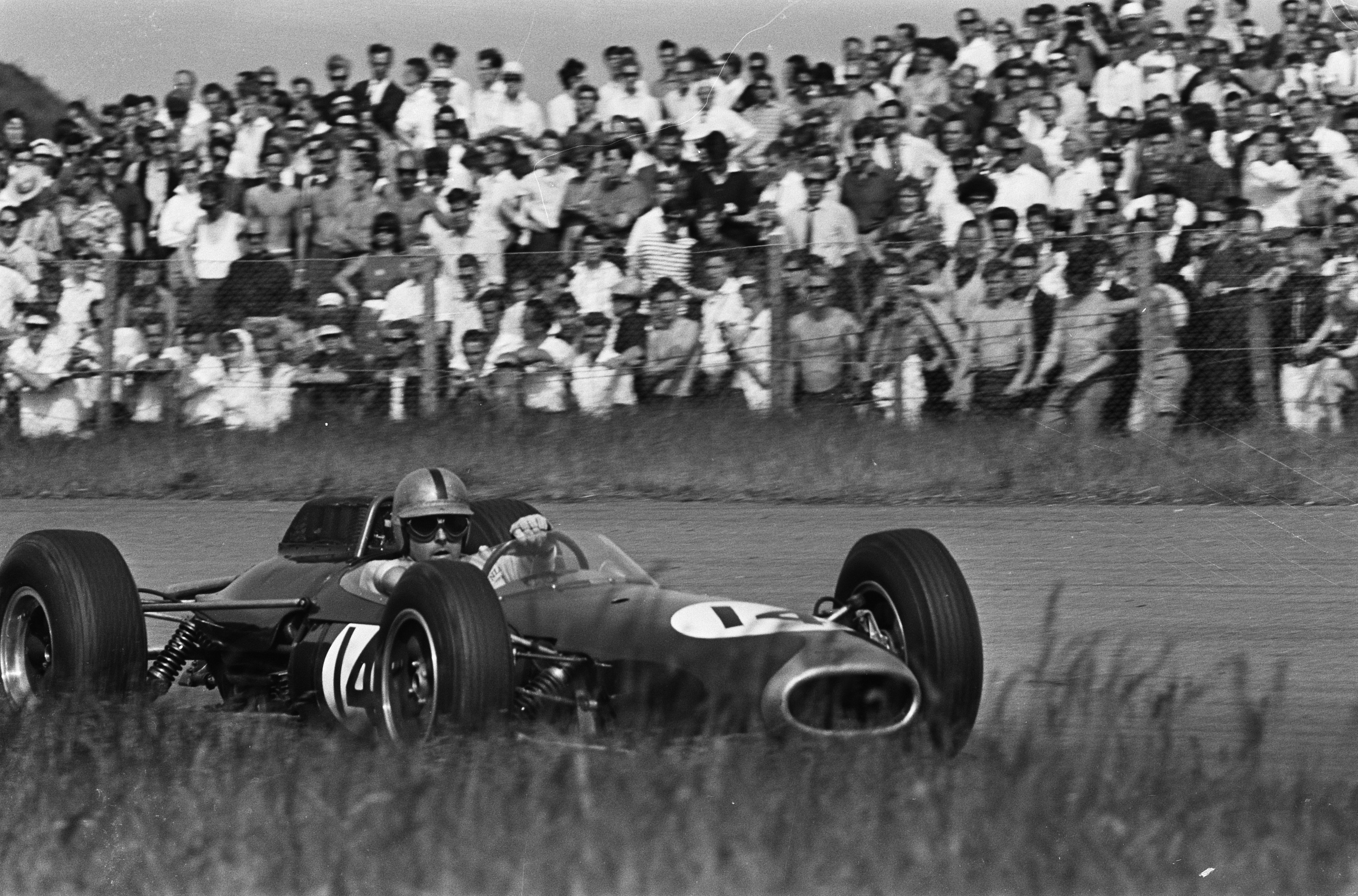 Grand Prix van Nederland, het rennersveld Jack Brabham, Brabham BT7.